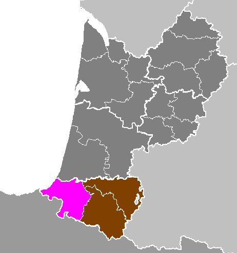 Maps of arrondissements and cantons of France: Département des Pyrénées-Atlantiques - Arrondissement de Bayonne.PNG (Région Aquitaine)